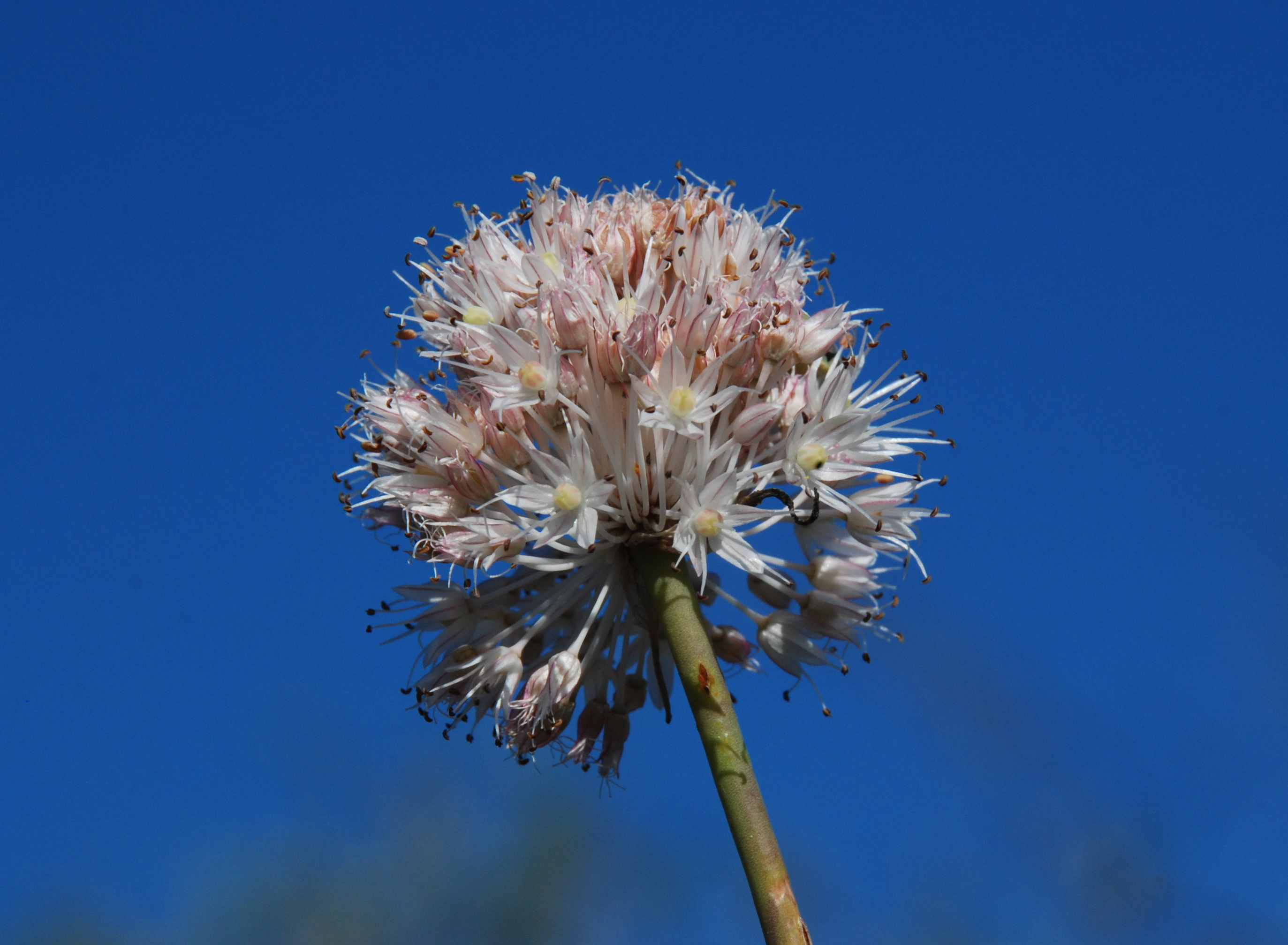 Відділення «Трьохізбенський степ», Новоайдарський район, Трьохізбенська с/р